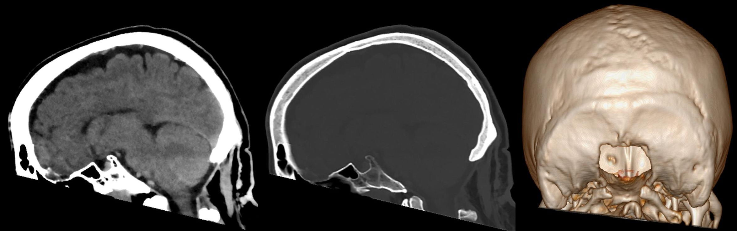 Computertomographie sagittal im Hirnfenster und Knochenfenster sowie als Volumenrendering bei Zustand nach Erweiterungsplastik am Foramen magnum mit Resektion des hinteren Atlasbogens bei Chiari-1 Malformation.